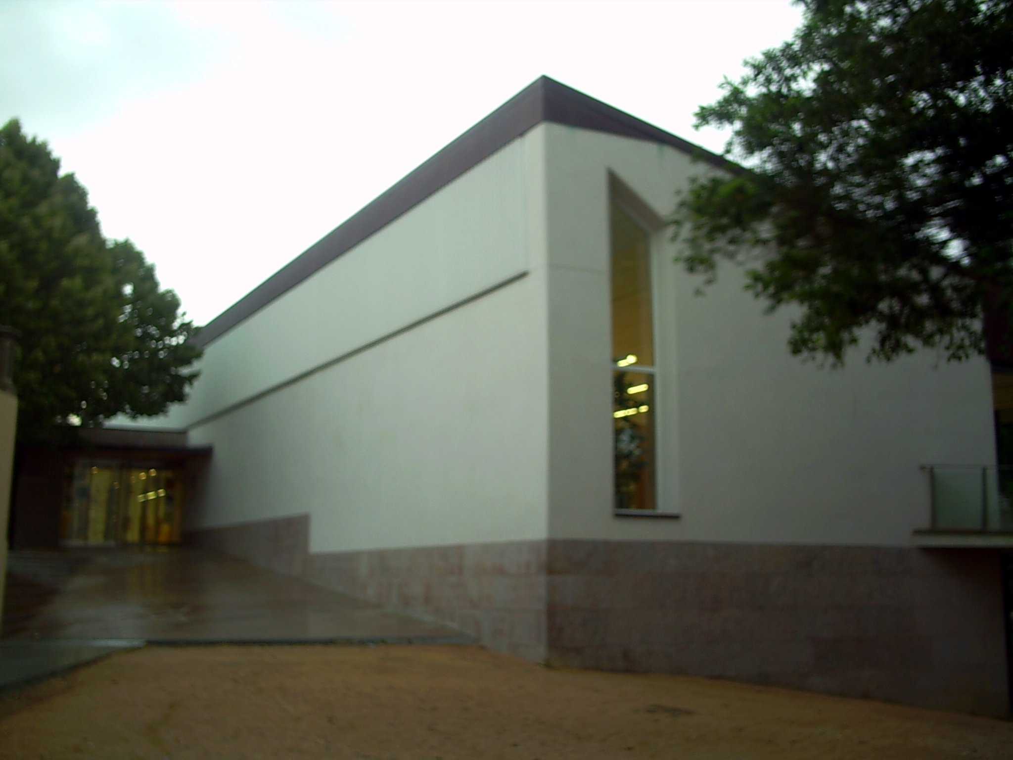 Biblioteca Jaume Perich i Escala, al sector de Can Figueres, a Premià de Dalt, el Maresme, (Catalunya).